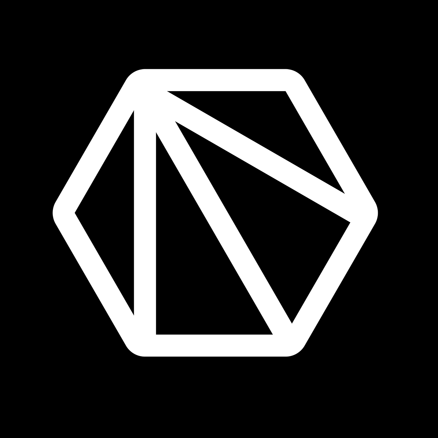 Das Logo des Genius Loci Weimar Festivals